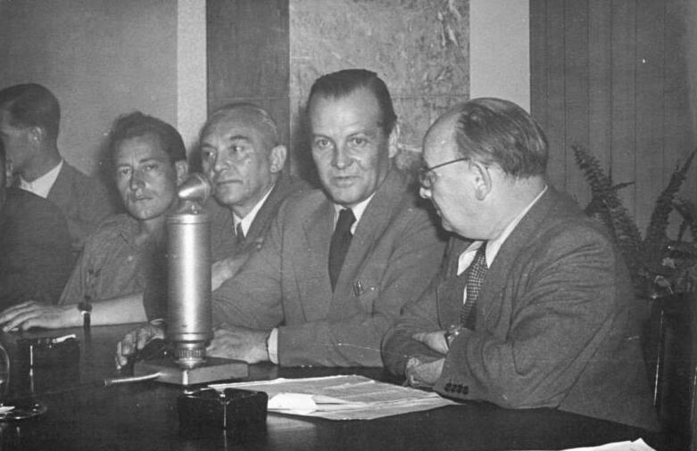 Illus Funck 31.7.1951 Pressekonferenz mit den Bauarbeitern der Festspielbauten (31.7.1951) Prof. Gerhard Eisler (rechts) und Prof. Paulick von der Sportwettkampfhalle an der Stalinallee beantworten Fragen der Pressevertreter.